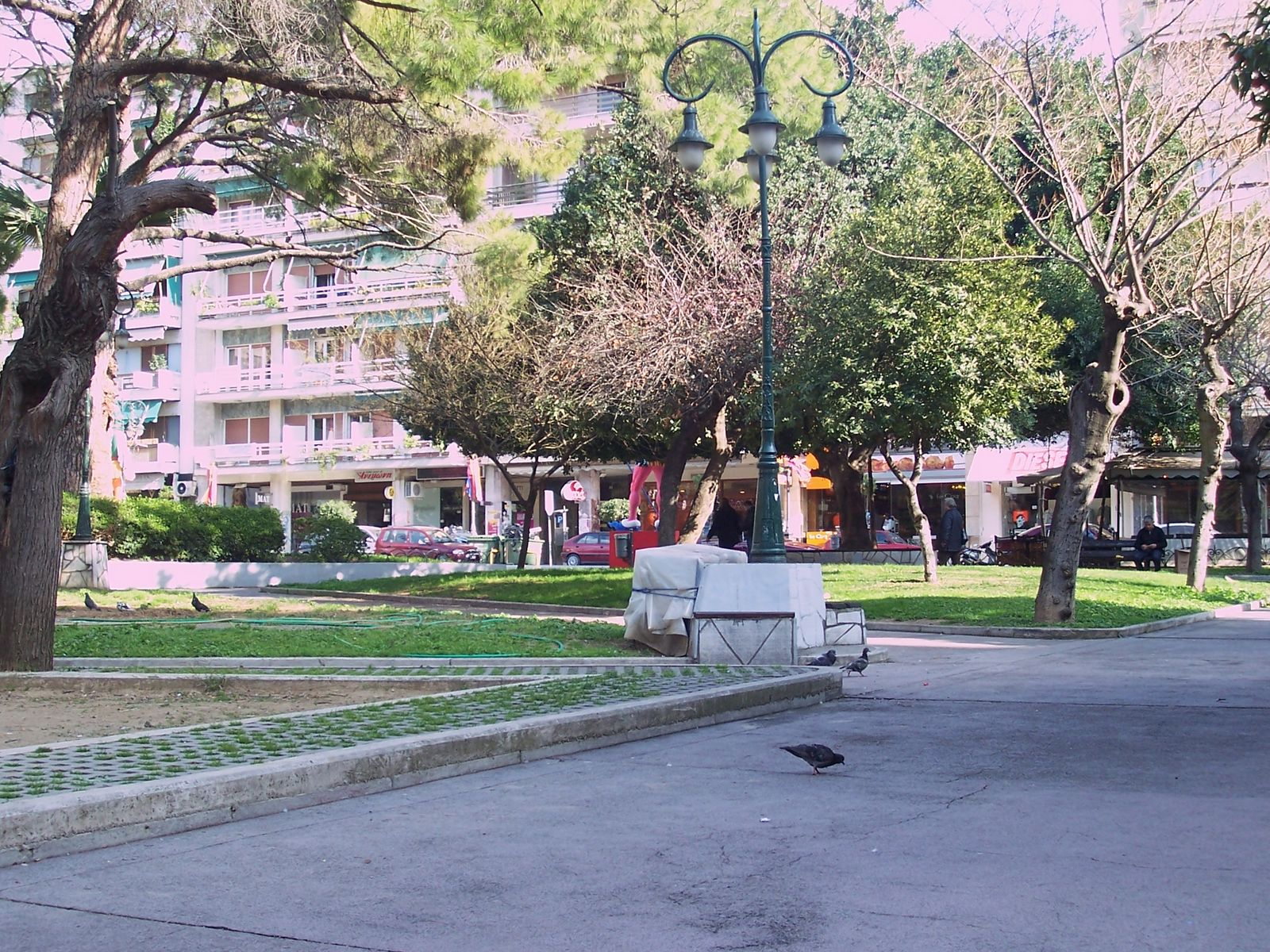 Patras, Grecia